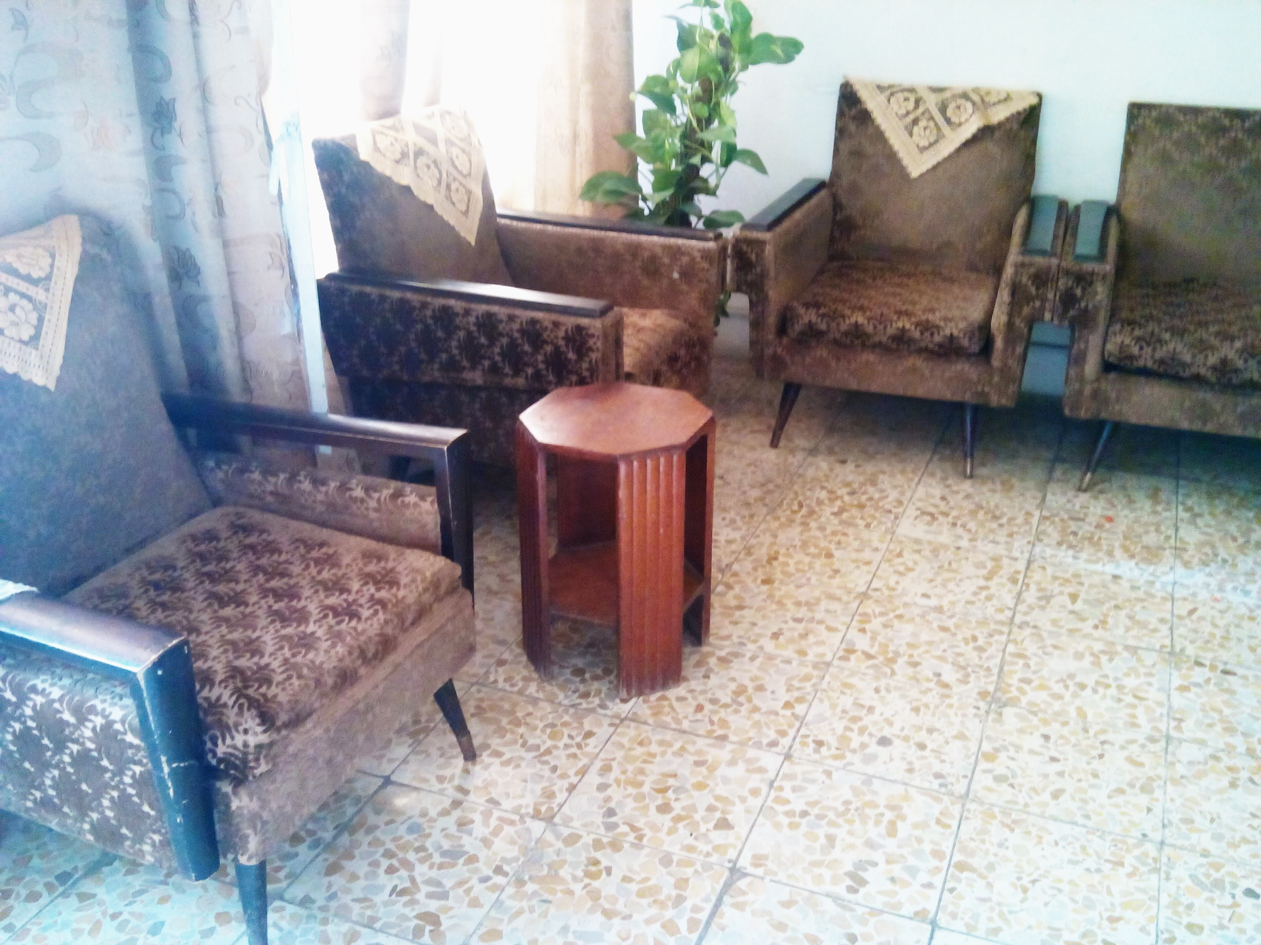 آثاث غرفة استقبال قديمة صنعت عام 1965 في منزل ببغداد عام 2015